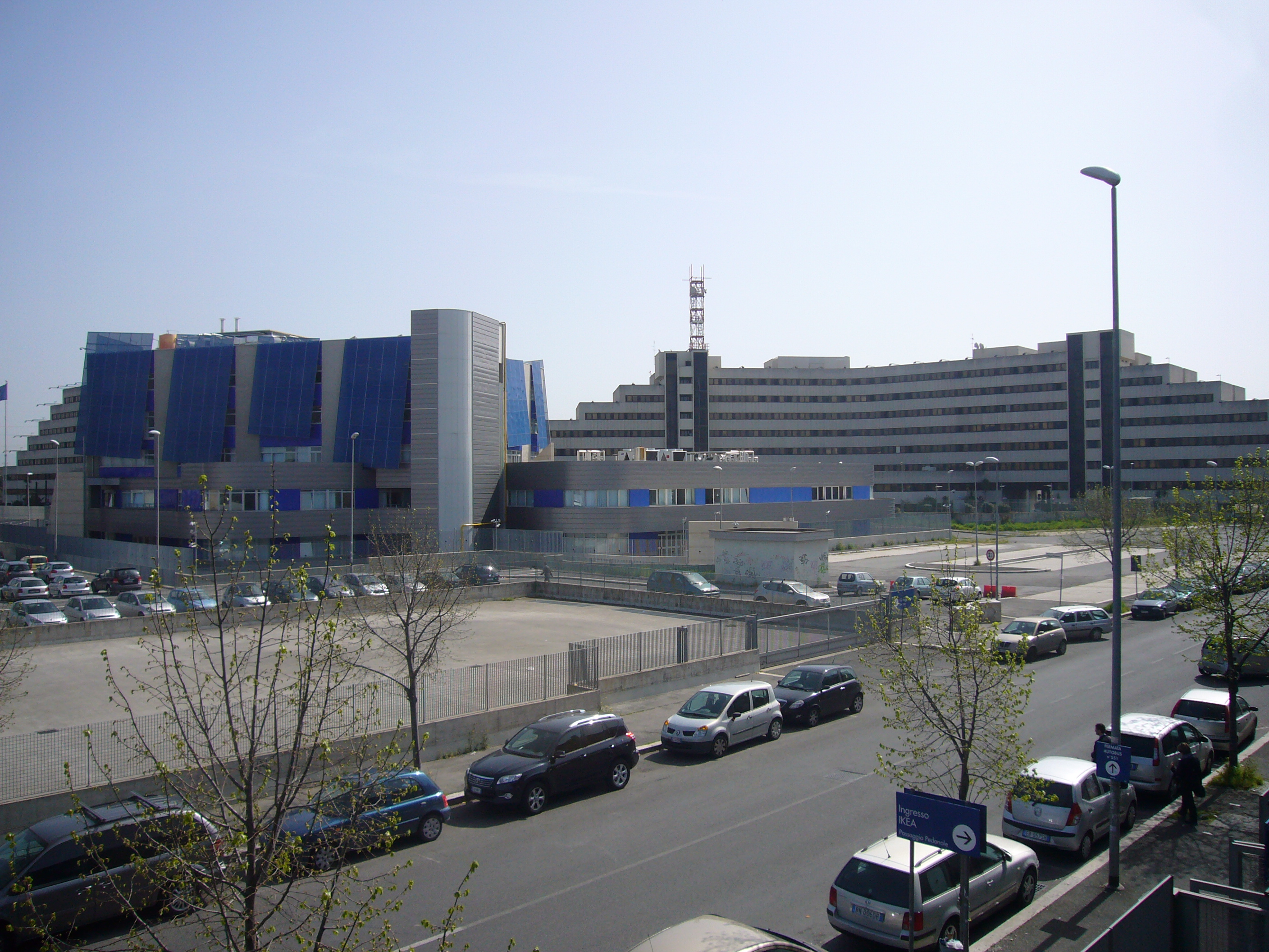 Roma, ex Municipio X, ora VII, urbanizzazione Anagnina Torre di Mezza via